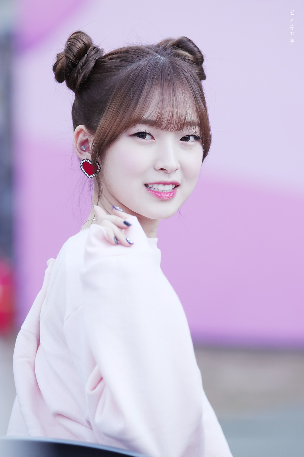 171028 대한민국 나눔대축제 아린 (4)